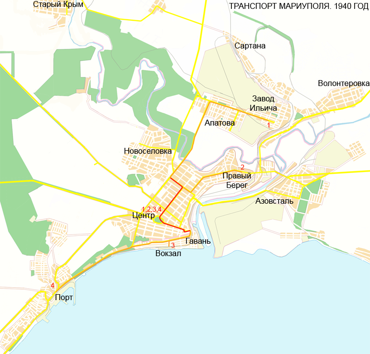 Mariupol transport map map